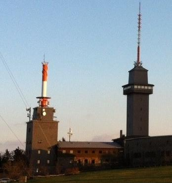 hr-Gebäude auf dem Großen Feldberg im Taunus